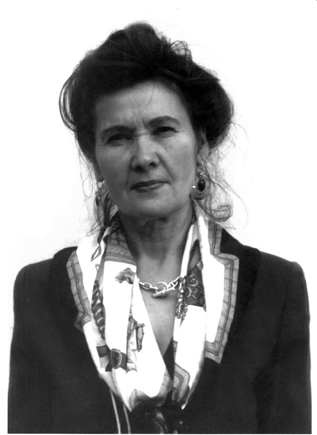 Karolina Kusek - Polish poet, song-writer and journalist.